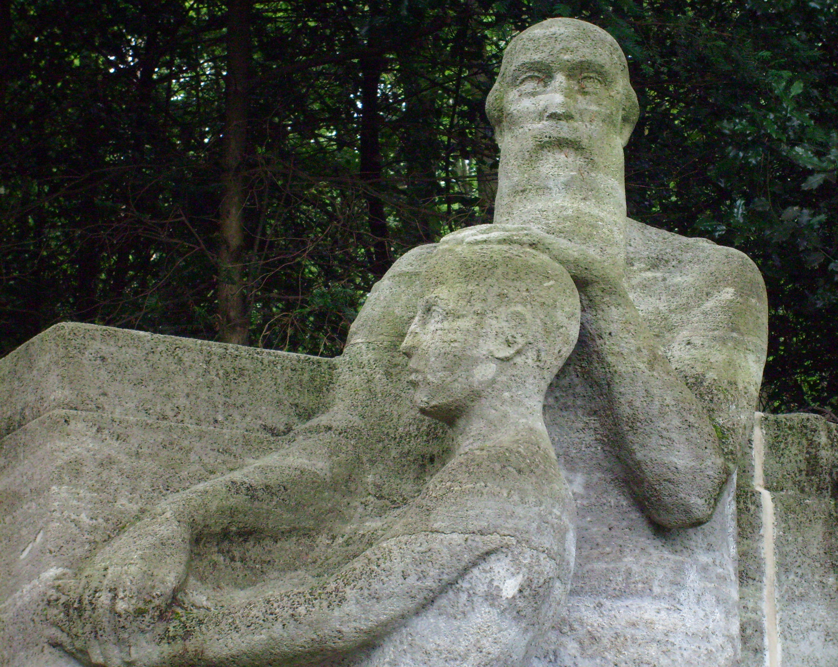 Kriegerdenkmal Wiederaufbau Deutschlands (Detail) auf dem Ehrenfriedhof Königshöhe in Wuppertal-Elberfeld. Skulptur von Wilhelm Rex